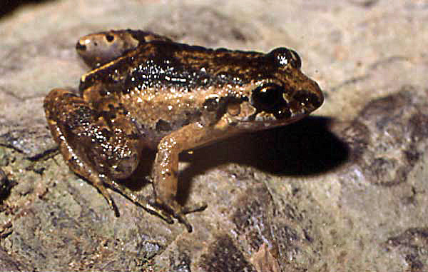 Adenomera andreae